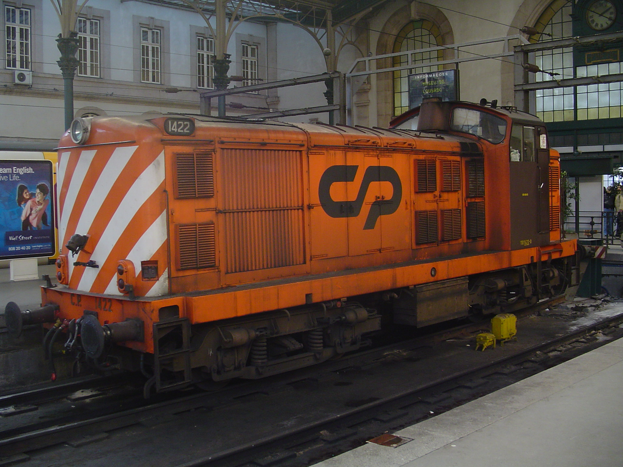 Locomotiva da CP